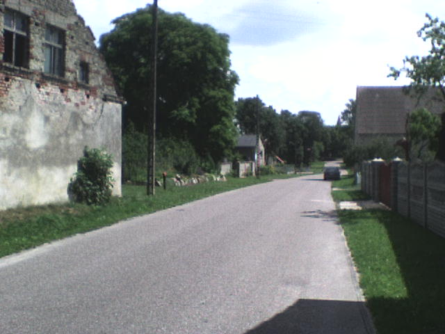 Sikorki, Zachodniopomorskie